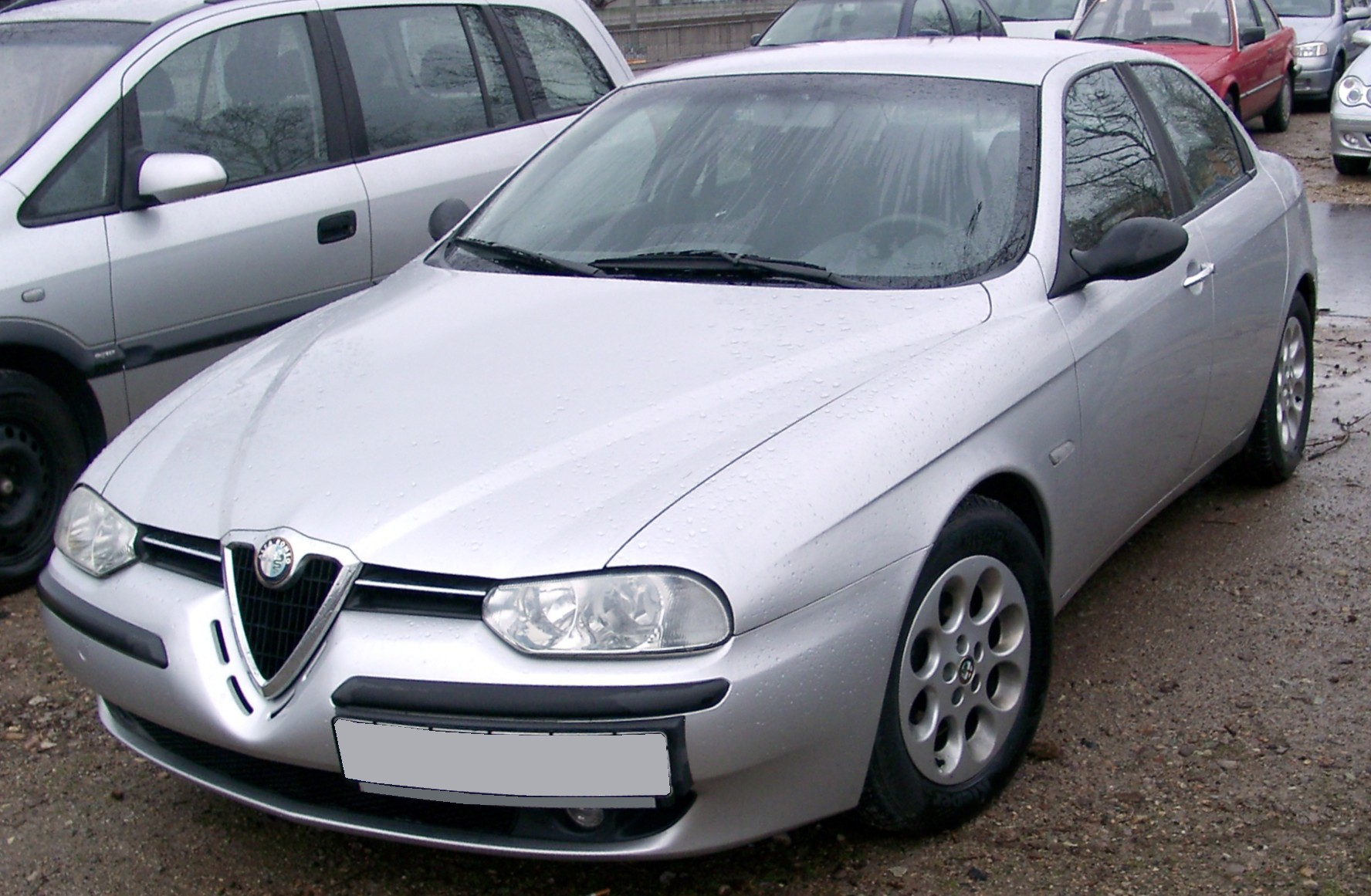 Alfa Romeo 156